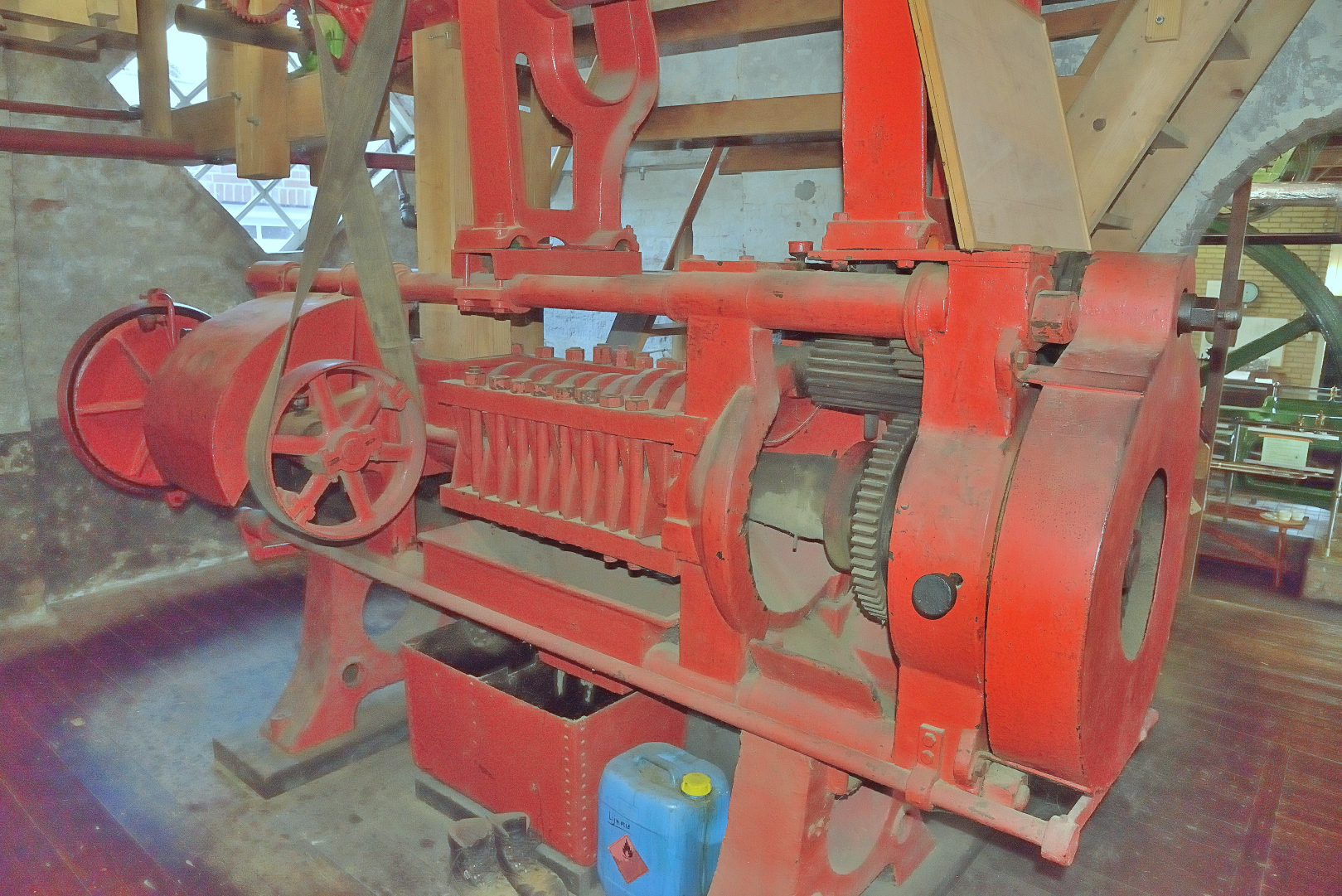 De Wachter, Zuidlaren, oliewringer voor lijnzaad